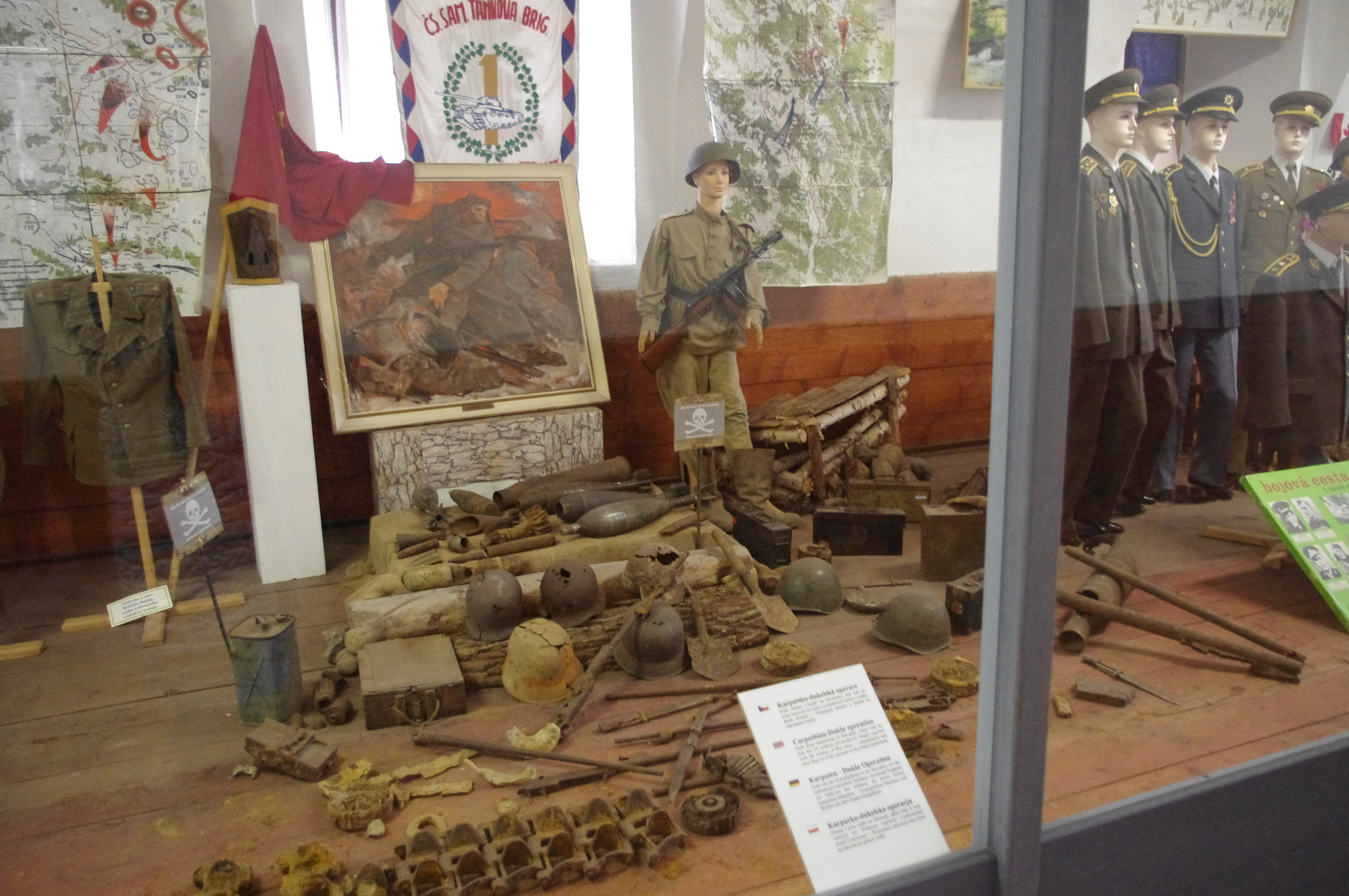 První vojenskohistorické muzeum M. Frosta